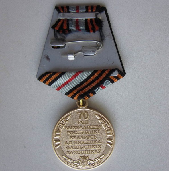 Юбилейная медаль в честь 70-летия освобождения Беларуси от немецко-фашистских захватчиков, реверс.